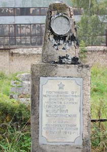 Один из памятников на месте расстрела евреев Орши во время Холокоста.